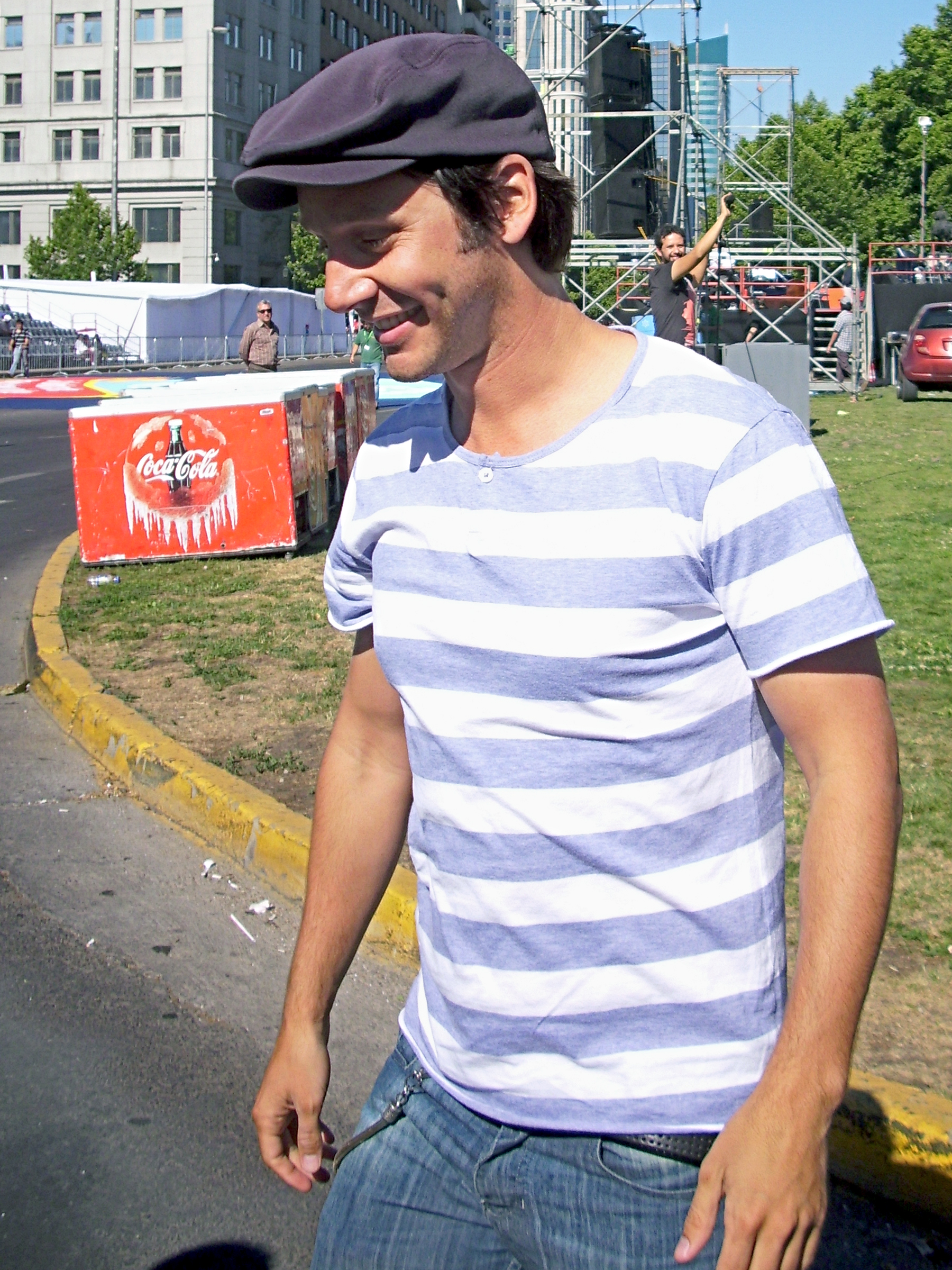 El actor chileno Benjamín Vicuña saludando al público que asistió al desfile París Parade Navidad 2010, organizado por Cencosud en diciembre de 2010 en la Avenida del Libertador Bernardo O'Higgins. Santiago de Chile.